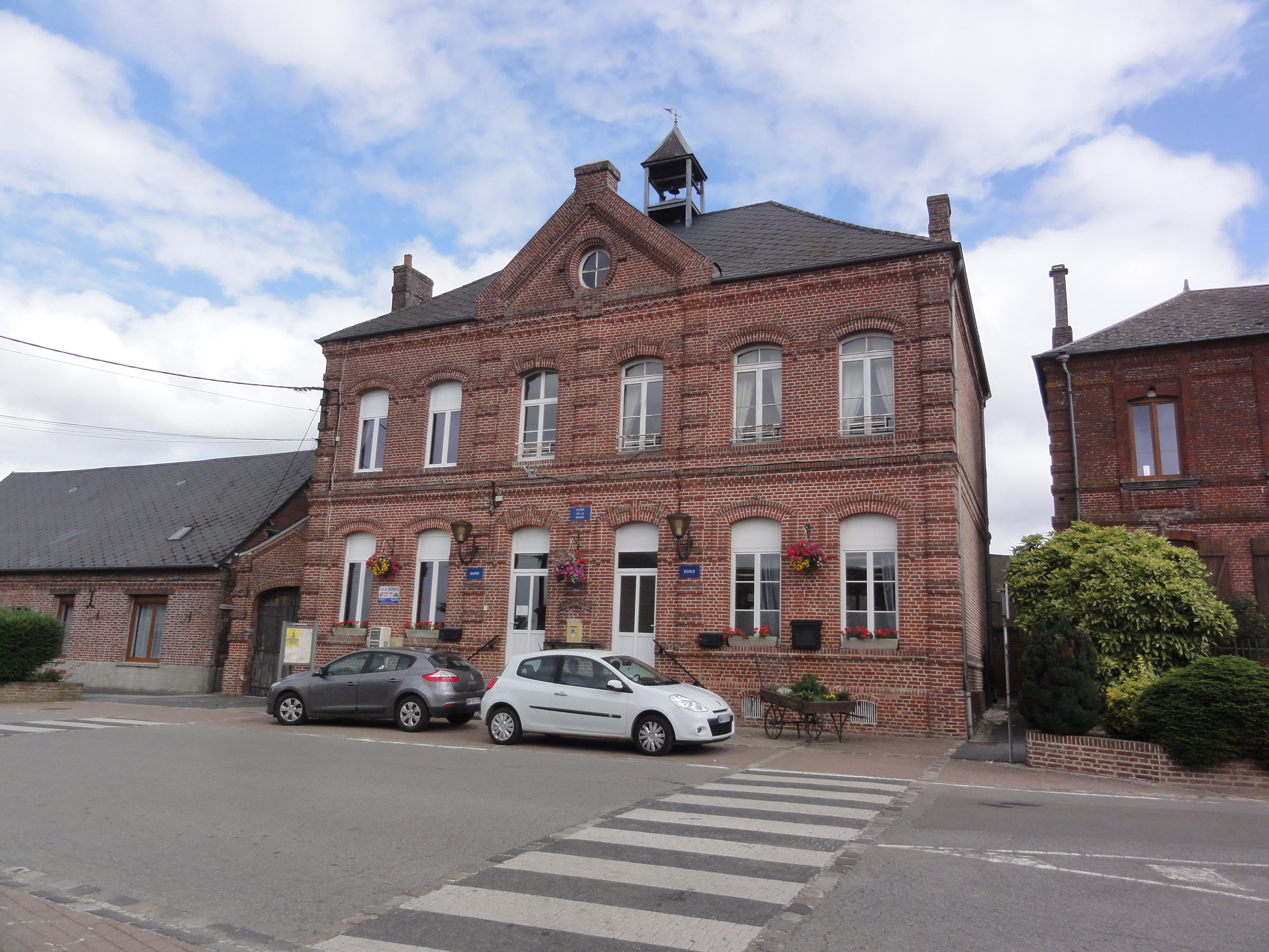 Landouzy-la-Cour (Aisne) mairie-école